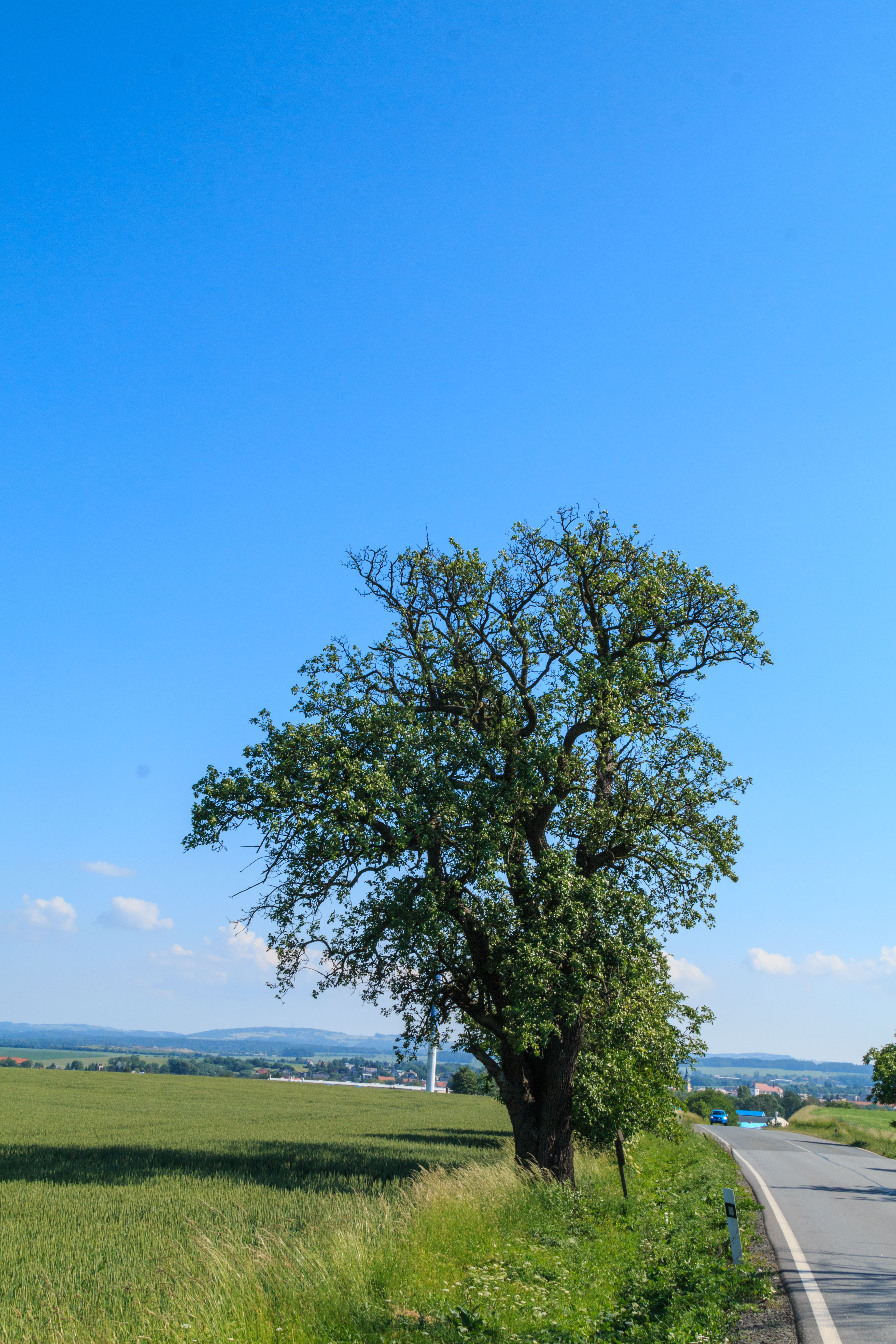 Památná hrušeň u silnice do Dobrušky